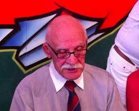 C’était le 6 juillet 2014, l’anniversaire de Michel Crauste, dit Le Mongol, qui fêtait ses 80 ans. L’événement se déroulait à Lourdes, au stade Antoine Béguère. Beau portrait de Michel Crauste.